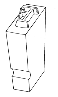 Tegning af blytype, bedre billede